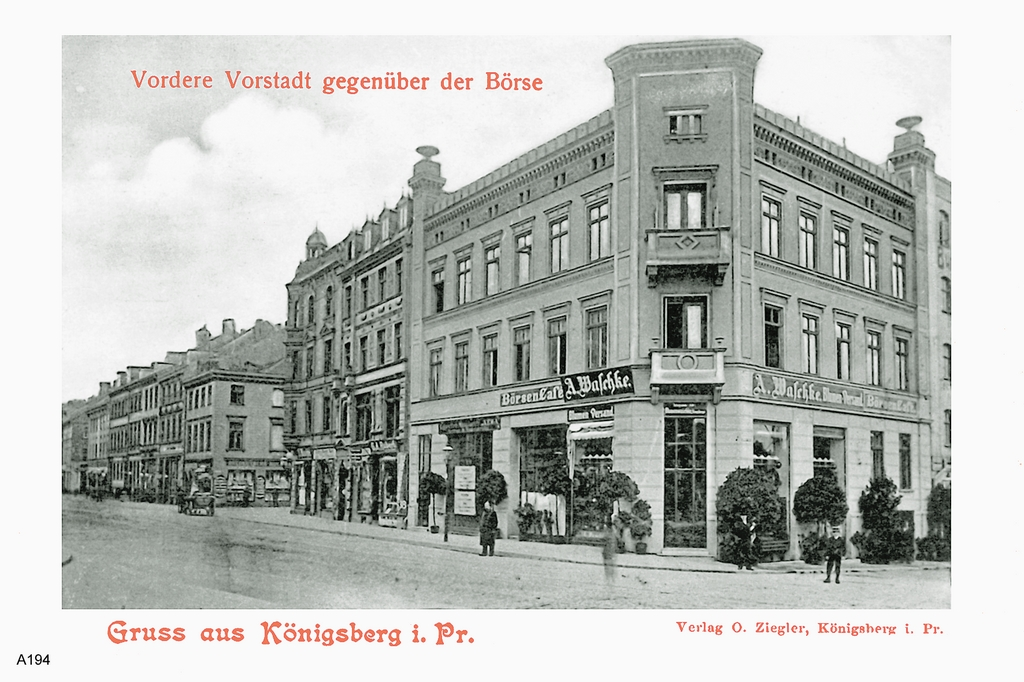 Königsberg